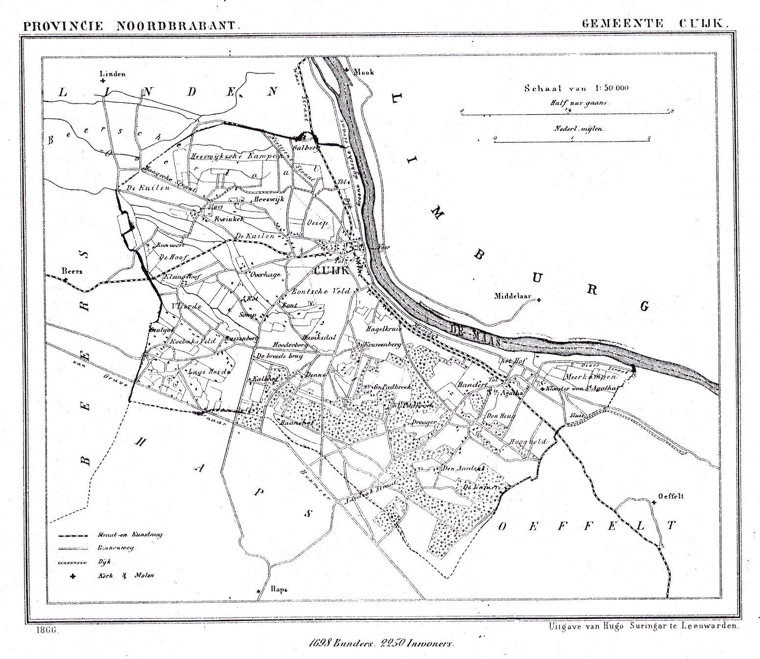 Nederland, Noord-Brabant, Gemeente Cuijk